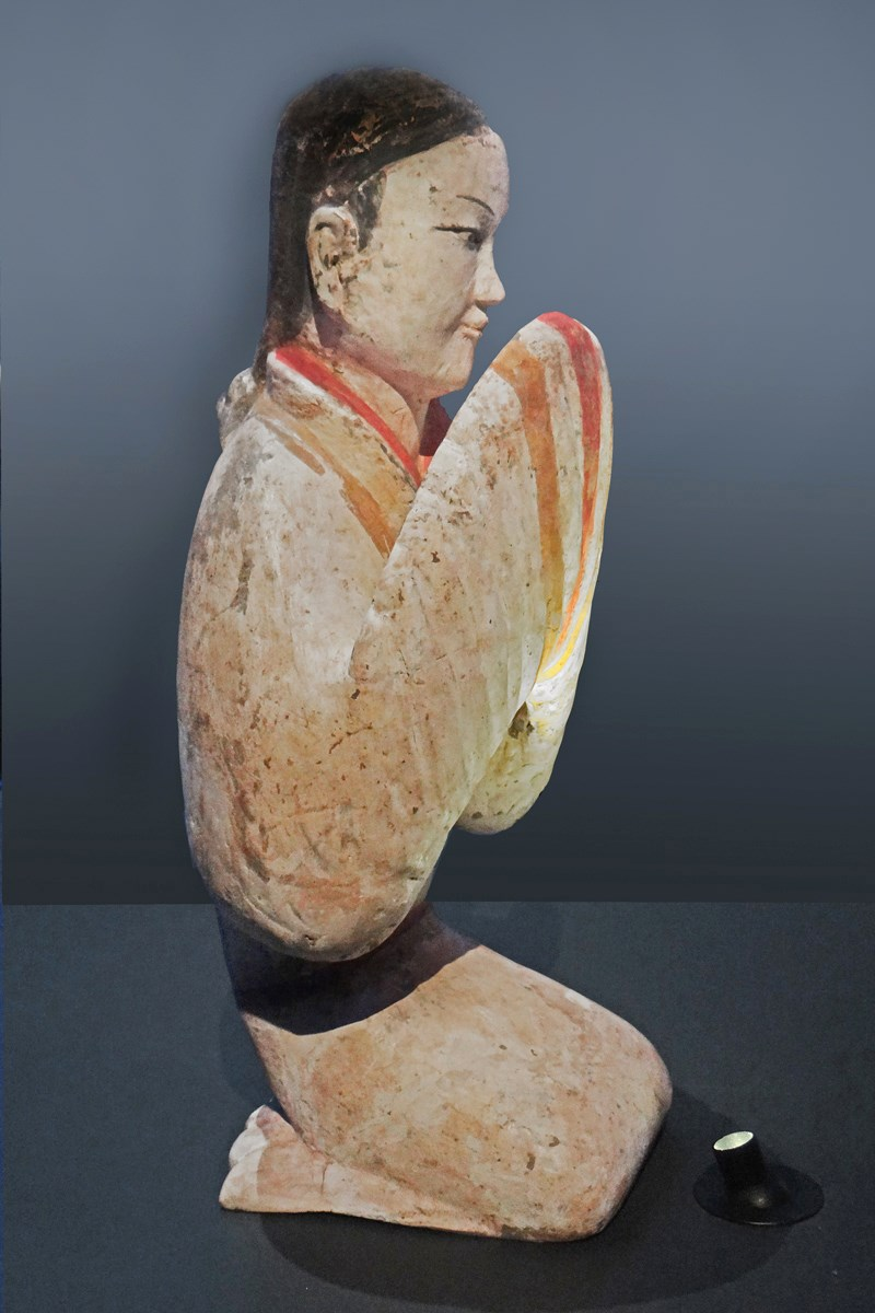 Figurine féminine Han de l'Ouest (206 av. J.-C. - 8 ap. J.-C.) Terre cuite Mausolée Yangling, tombe satellite Xianyang, province de Shaanxi Fouilles 1997, musée Han Yongling, Chine Objet présenté dans l'exposition : "Splendeurs des Han, essor de l'empire Céleste" au musée national des arts asiatiques - Guimet jusqu'au 1er mars 2015